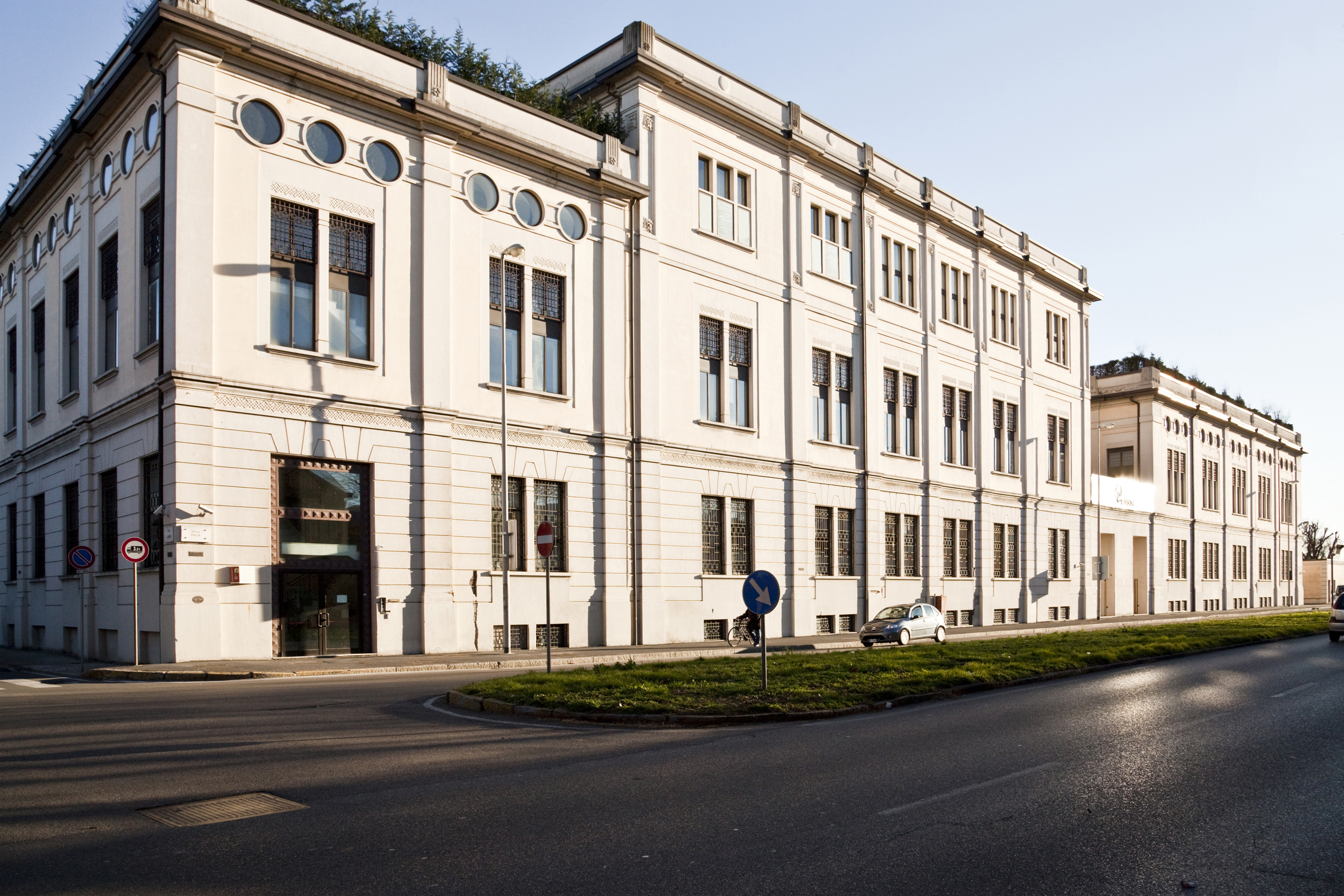 Centrale elettrica a gas che oltre a produrre energia elettrica attraverso il teleriscaldamento da acqua calda al comune di Sesto S. Giovanni This is a photo of a monument which is part of cultural heritage of Italy.